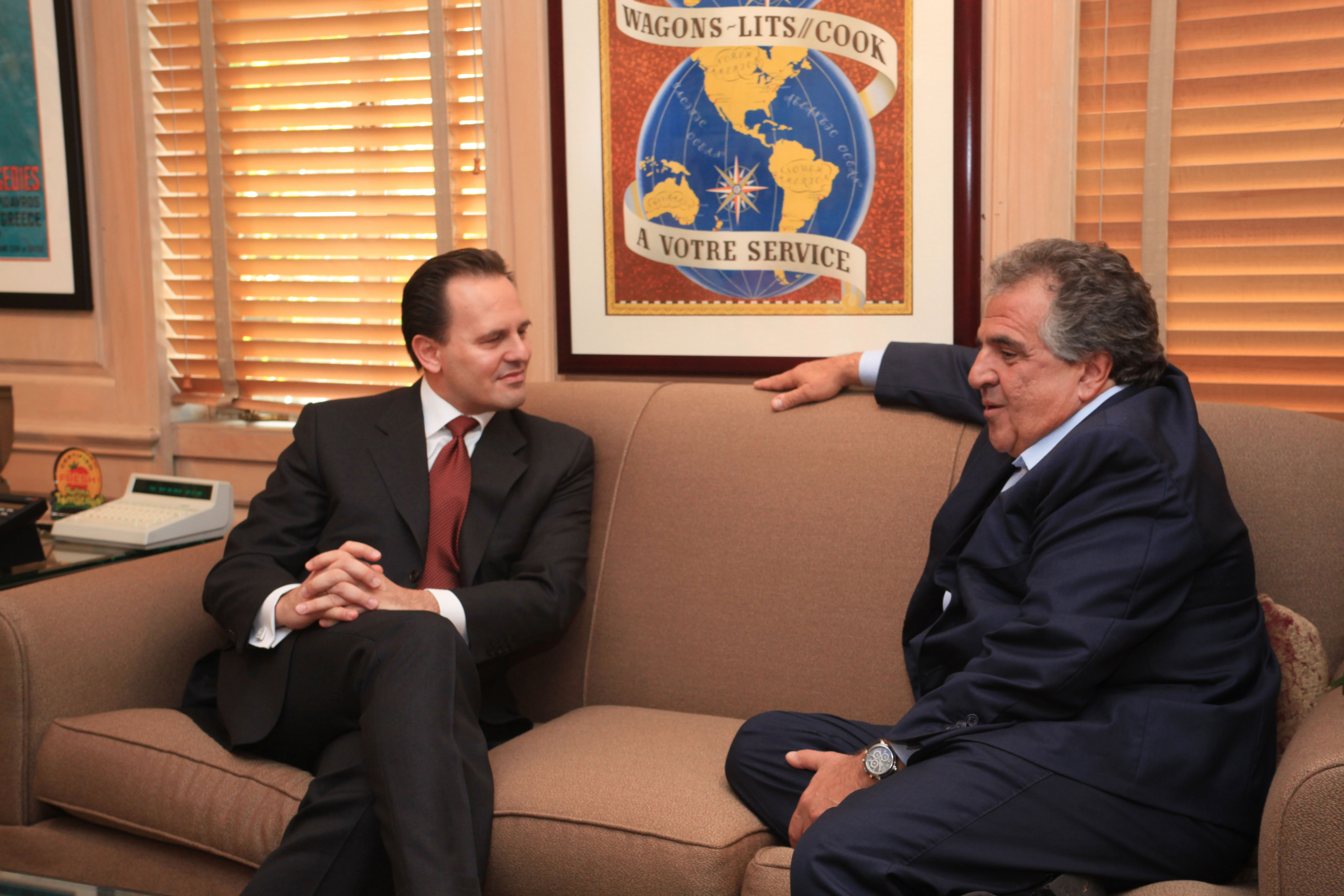 Συνάντηση ΥΠΕΞ κ. Δ. Δρούτσα με τον διευθύνοντα σύμβουλο της Fox, κ. Τζιμ Γιαννόπουλο